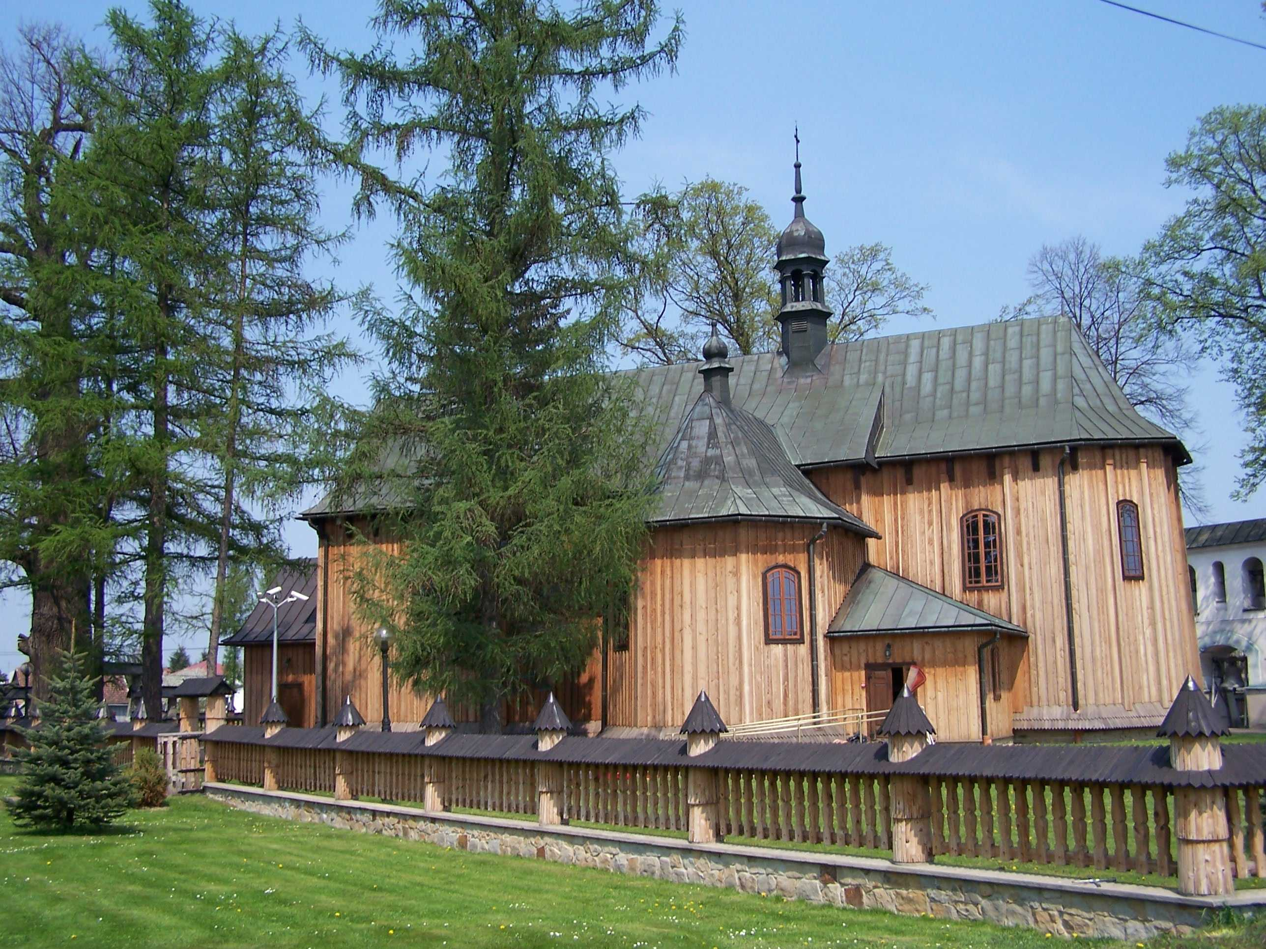 Zabytkowy kościół w Humniskach